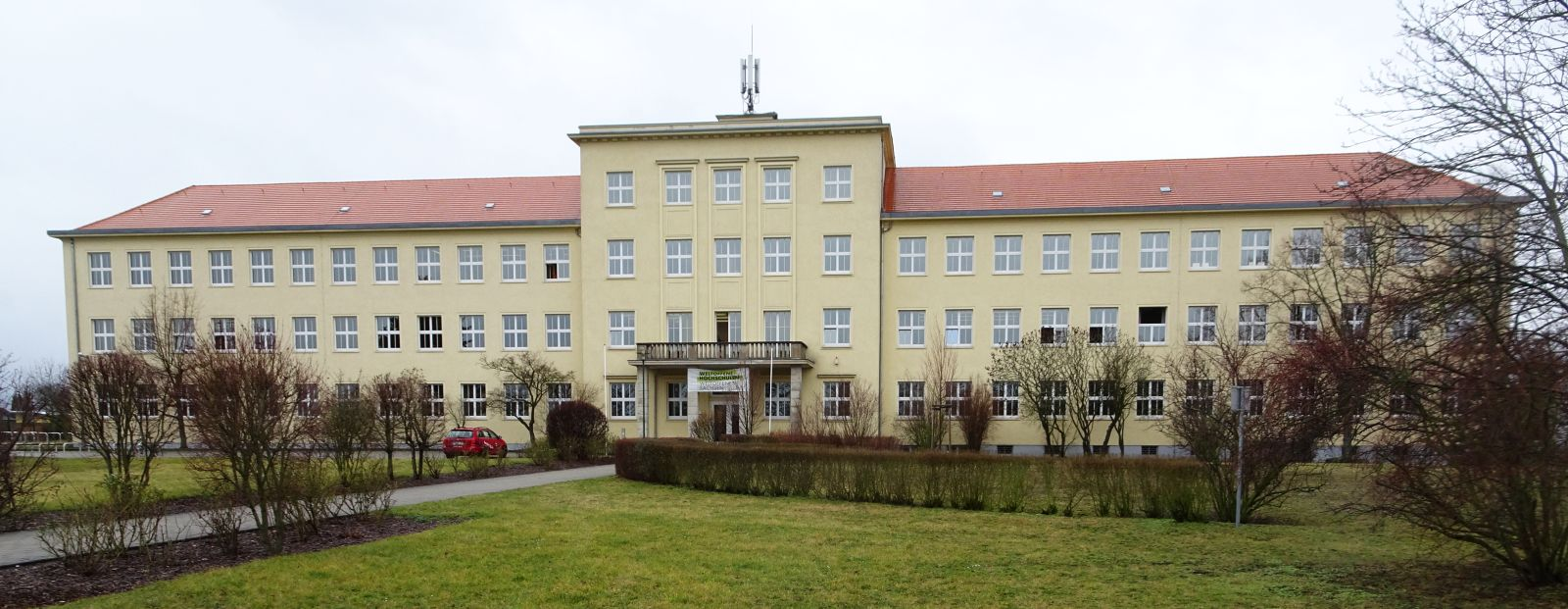 Staatliche Studienakademie Leipzig